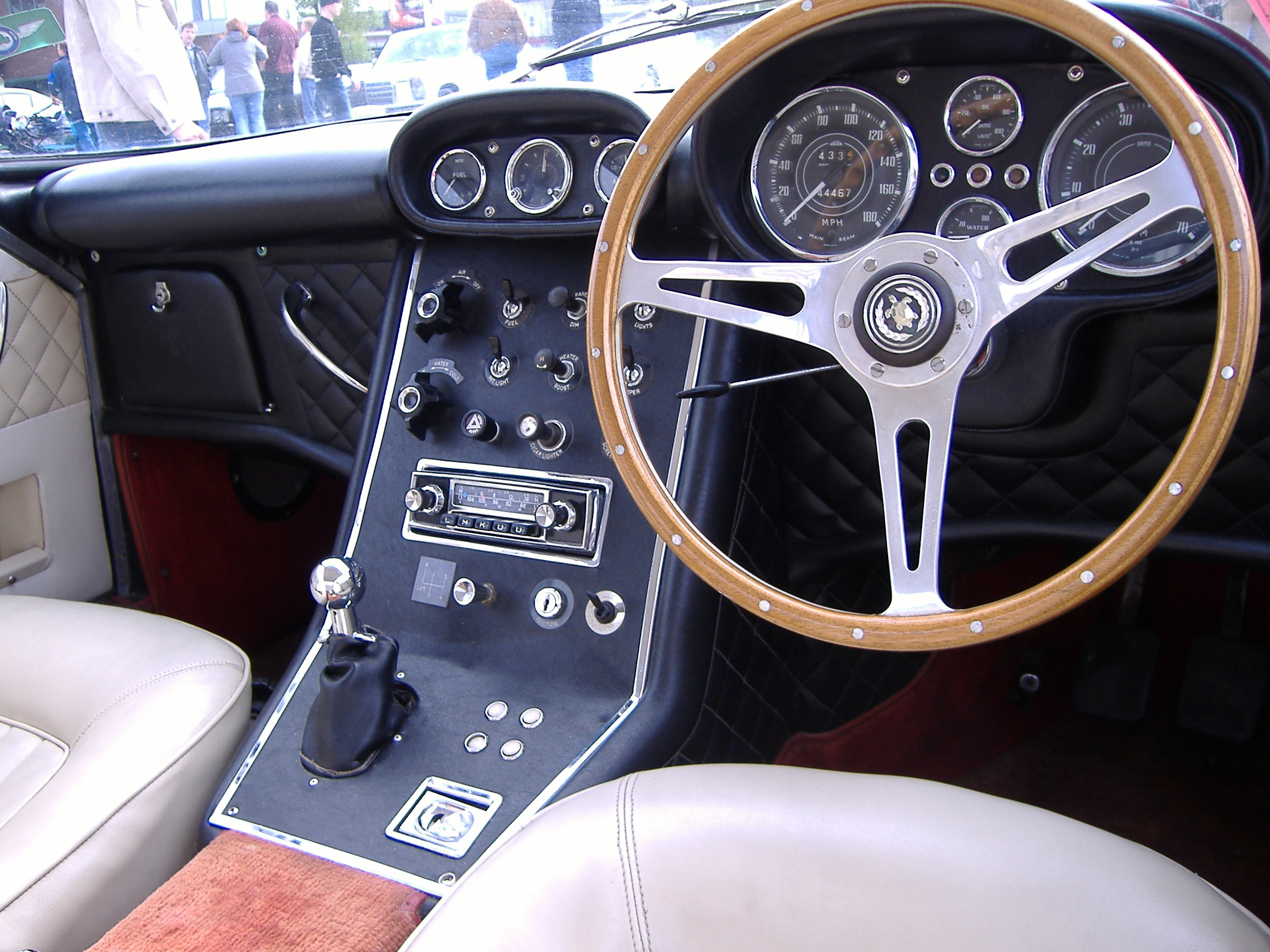 Gordon Keeble Cockpitansicht